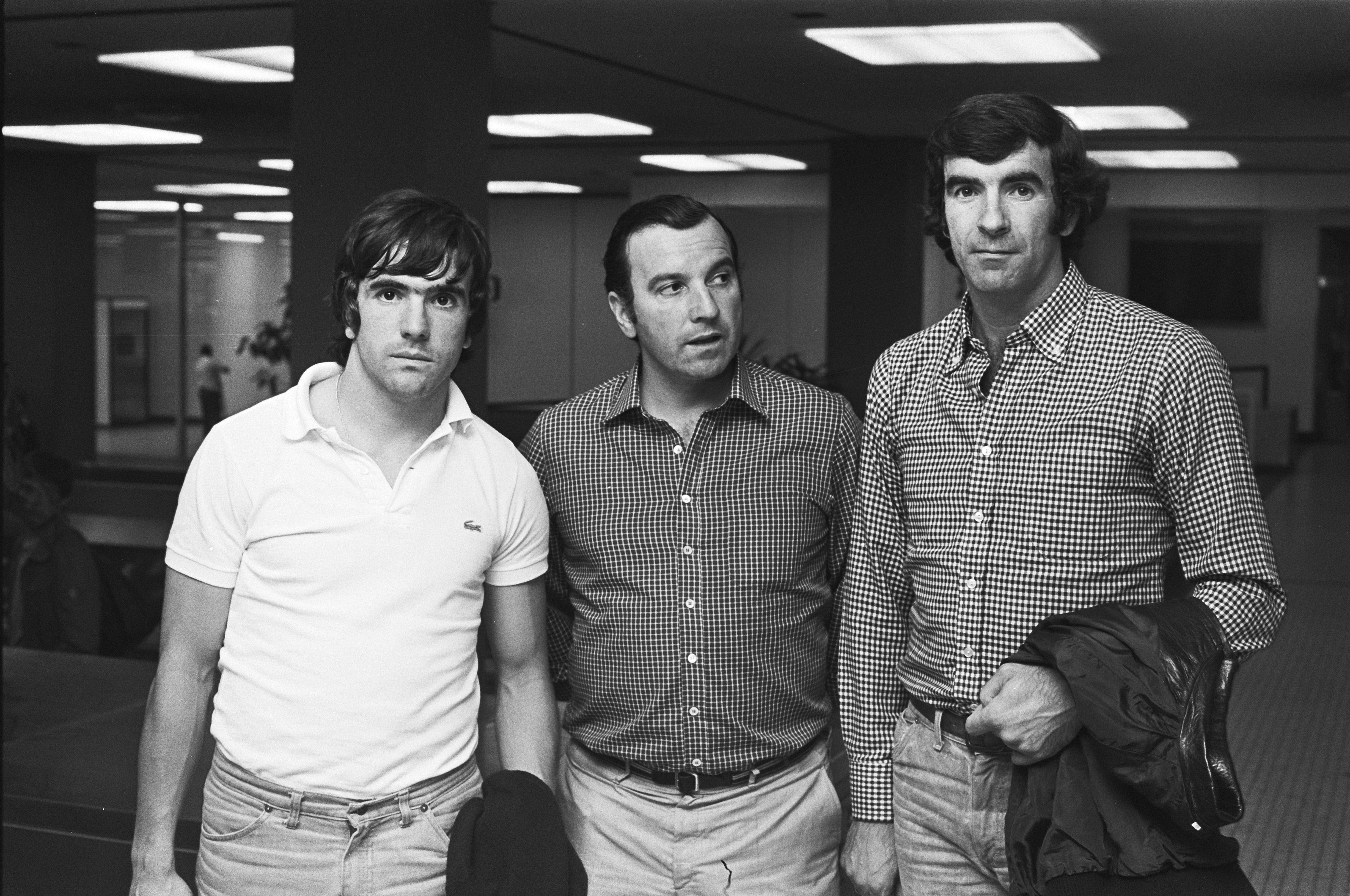 Arrivée de l'Athletic Bilbao à l'aéroport d'Amsterdam-Schiphol. De gauche à droite Dani, l'entraîneur Aguirre et le gardien de but Iribar. Photographie par Bert Verhoeff / Anefo.